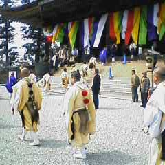 奈良県吉野町・金峯山寺蔵王堂での修験者勧進